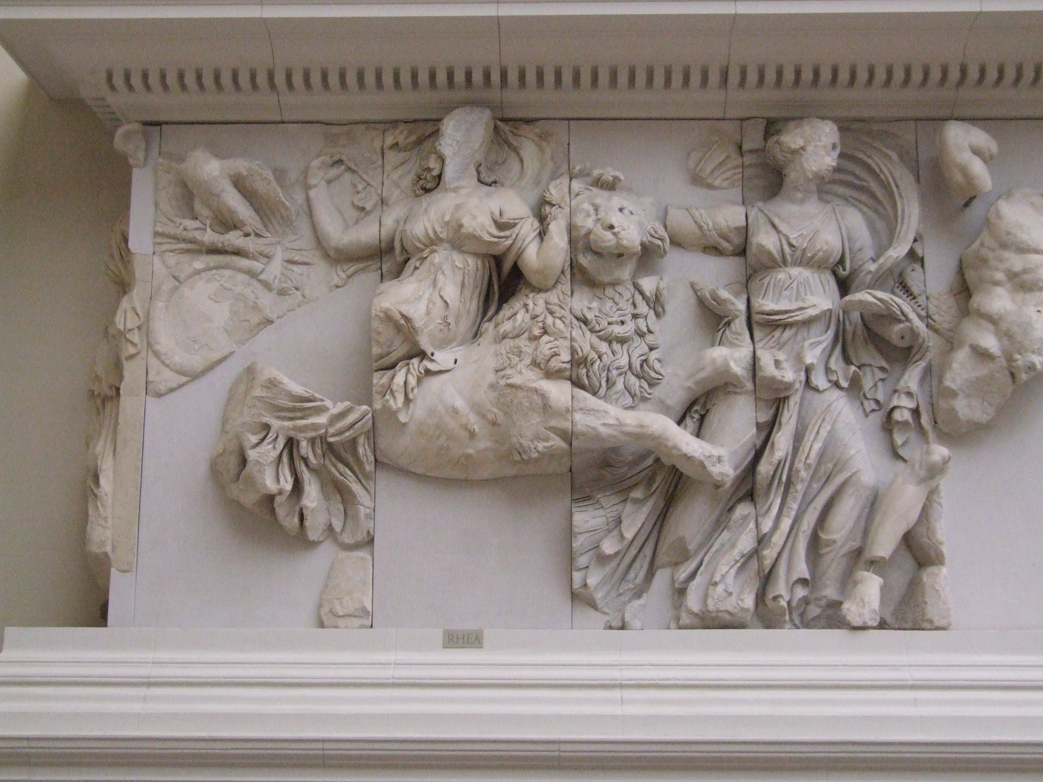 Pergamonnmuseum Berlin, Pergamonaltar, Gigantomachie, Rhea reitet auf einem Löwen, Rhea rides on a lion, Andrasteia (?)